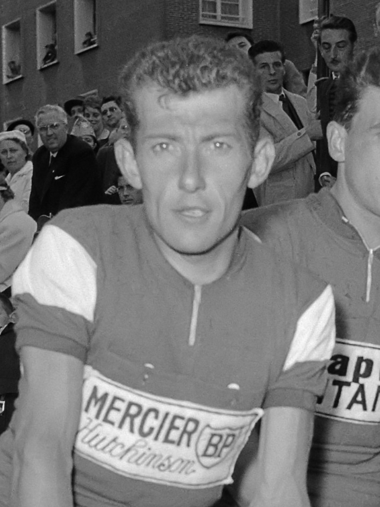 Tour de France , finish in Duinkerken (links Privat) 28 juni 1960